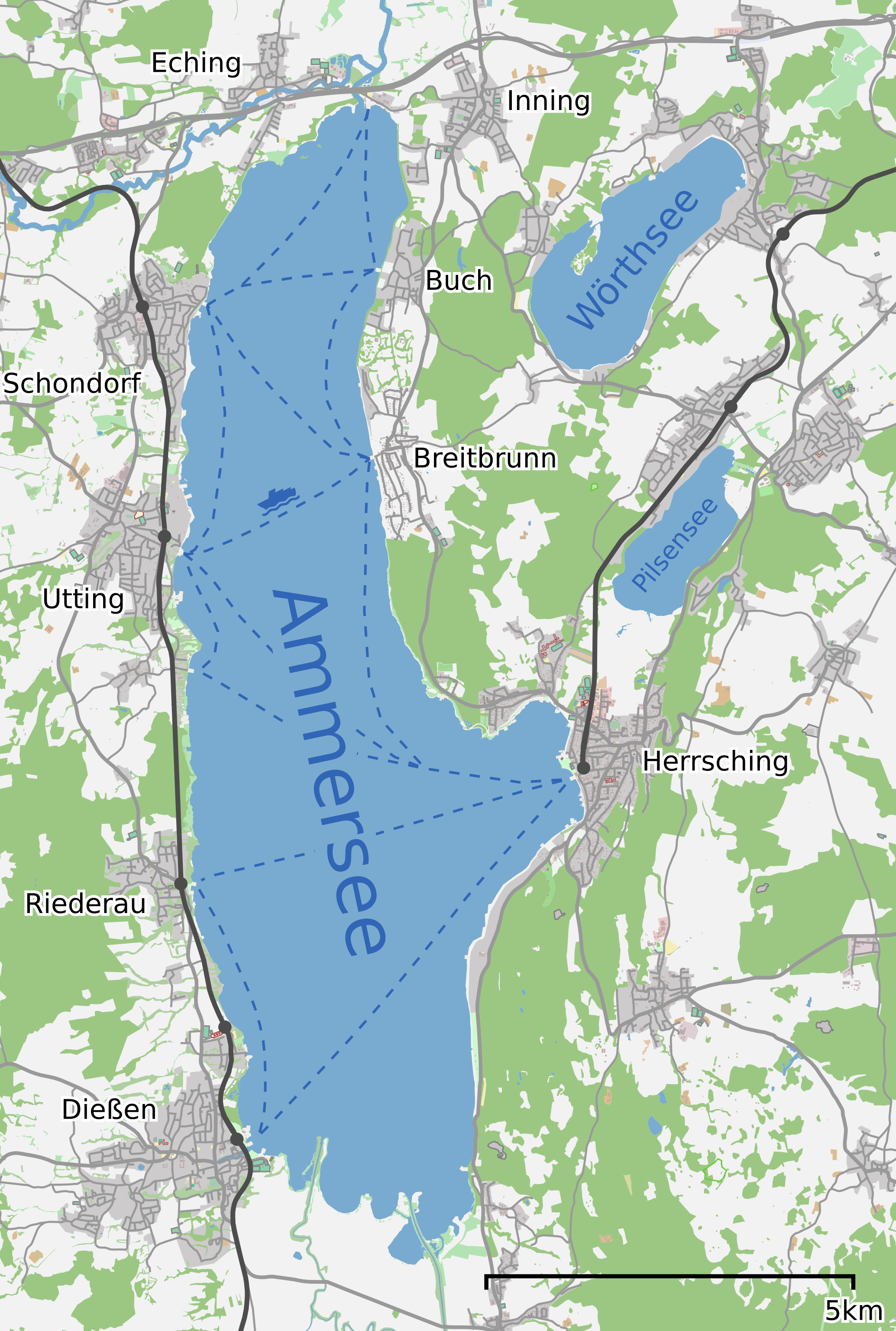 Karte des Ammersees basierend auf OpenStreetMap